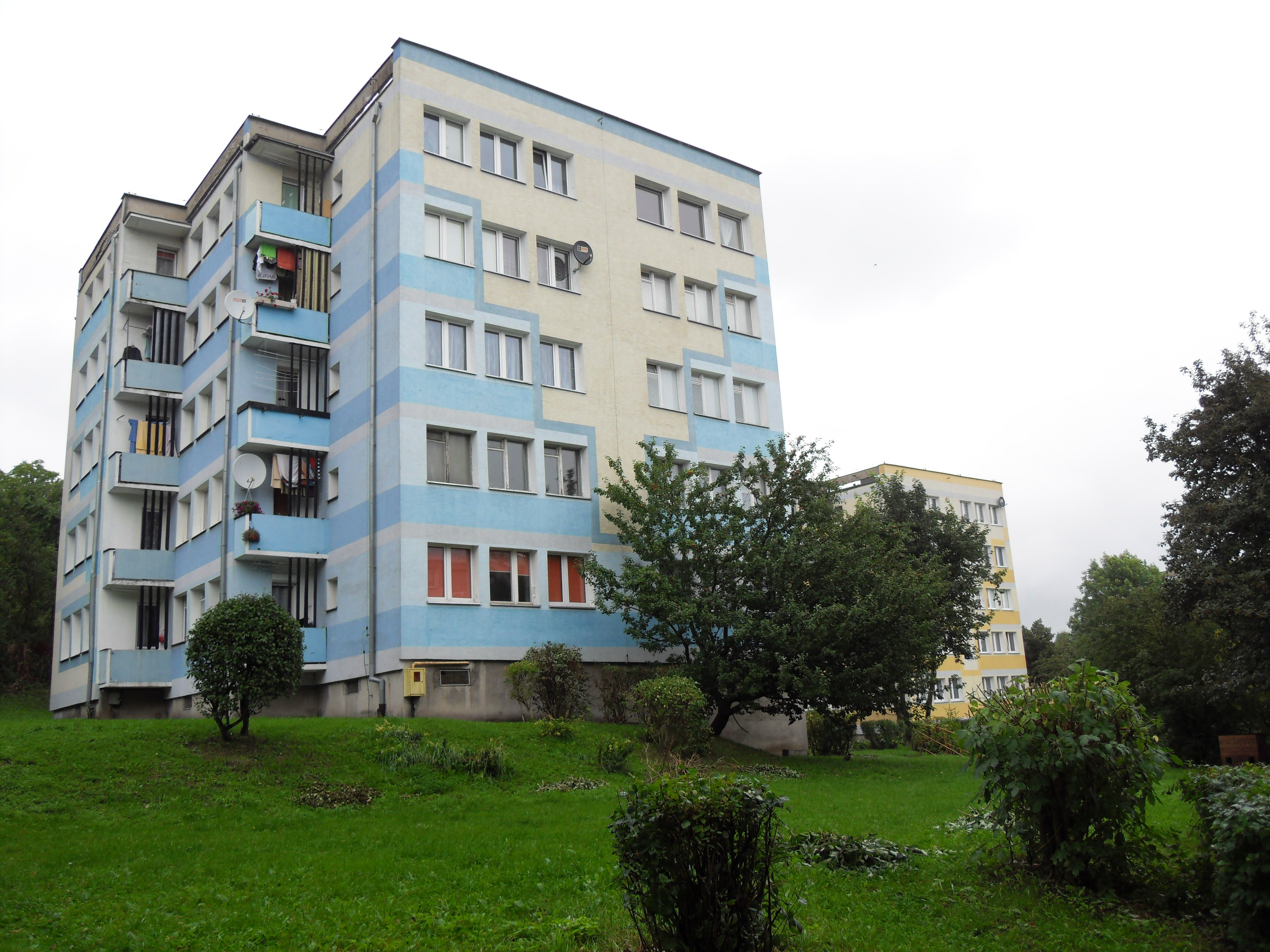 Gdańsk Orunia, osiedle Ptaszniki. Ul. Diamentowa 10.